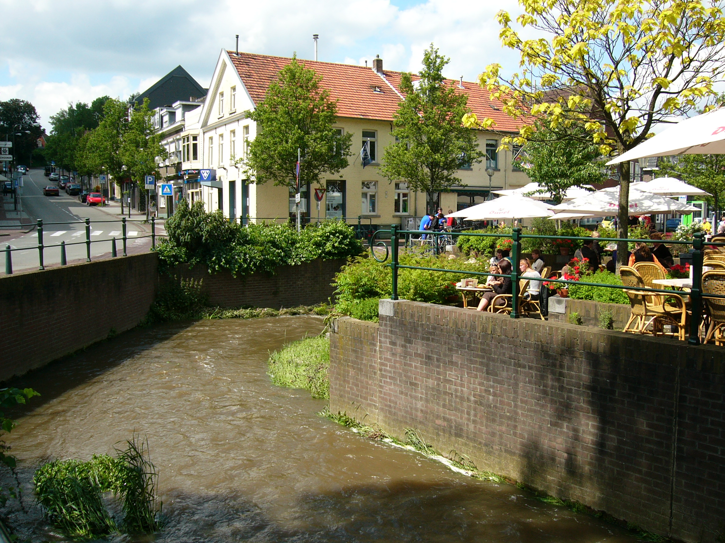 Zicht op een deel van de Dorpsstraat in het centrum van Gulpen Foto door Cicero